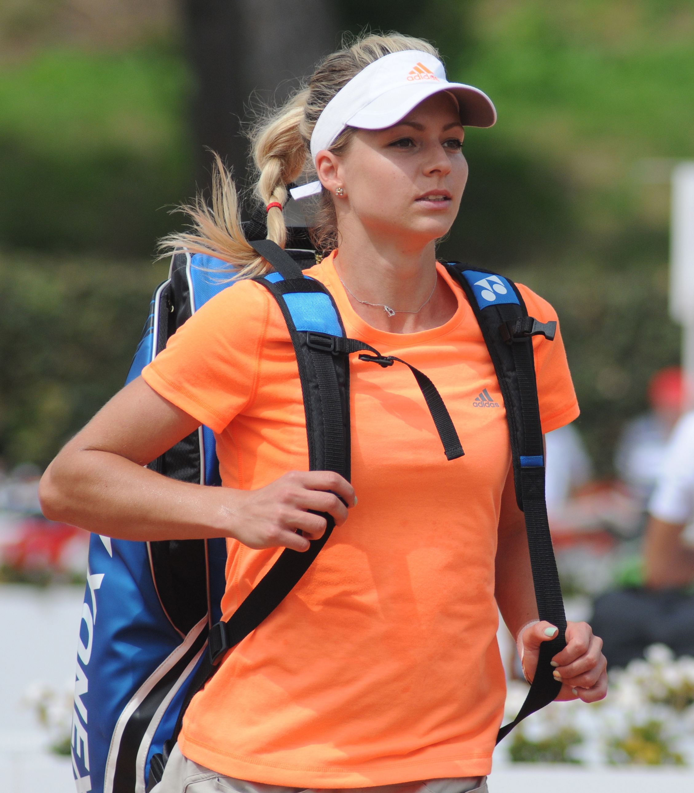 Maria Kirilenko at the 2014 Internazionali BNL d'Italia